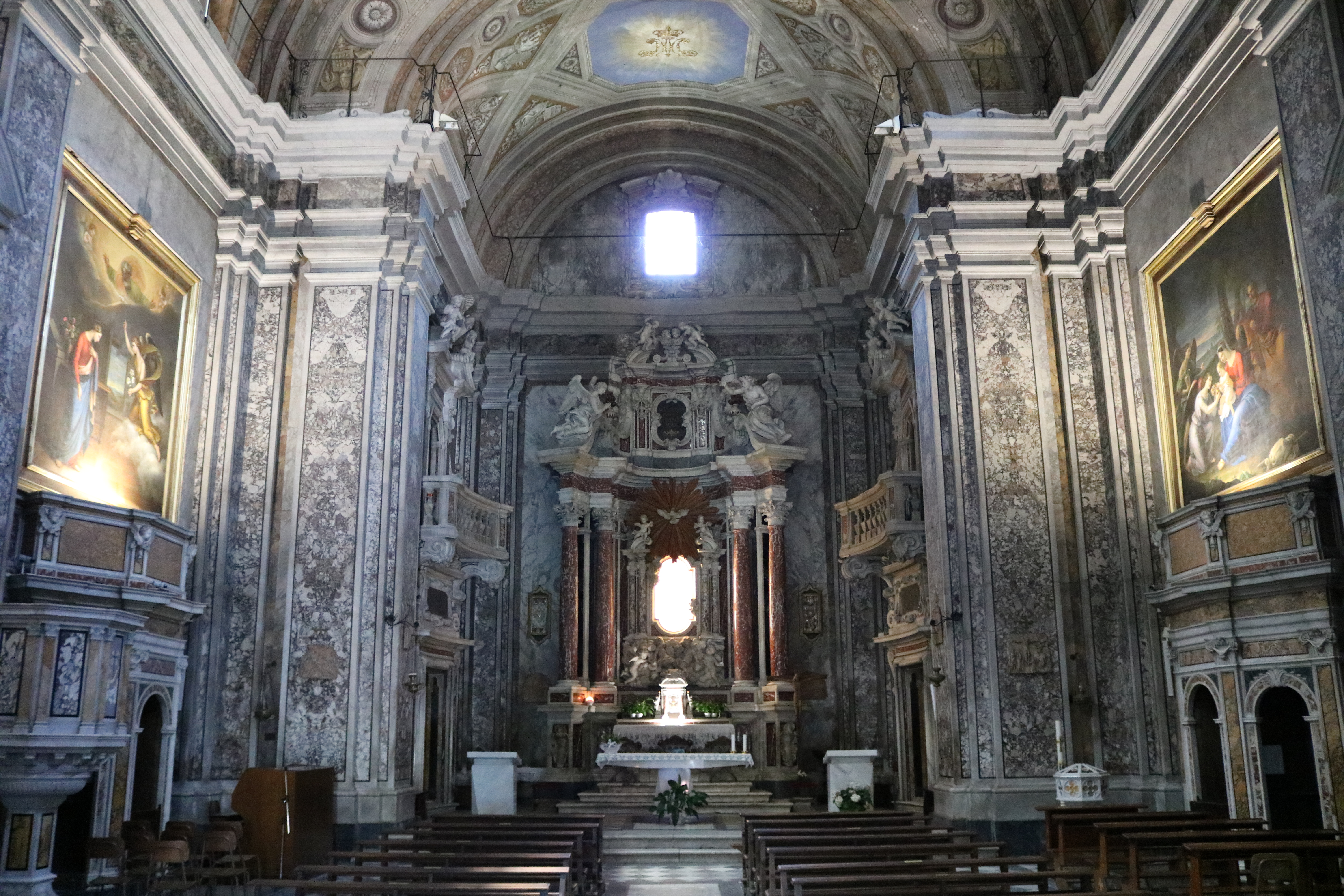 Madonna delle Grazie alla Lugnola (Carrara)